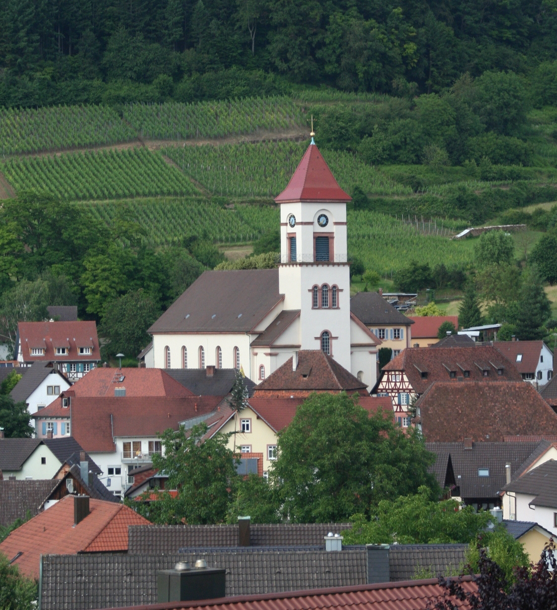 Pfarrkirche Zum Heiligen Kreuz in Münchweier, 1828-29 nach Plänen von Hans Voss gebaut